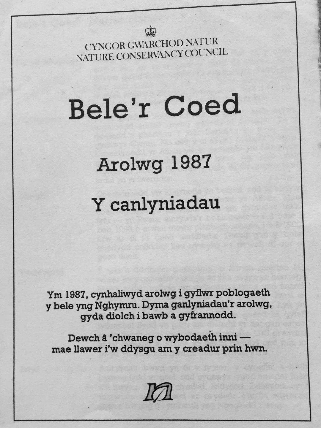 Clawr llyfryn yn cyflwyno canlyniadau arolwg i'r boblogaeth y bele goed yng Nghymru yn 1980au sydd bellach allan o brint